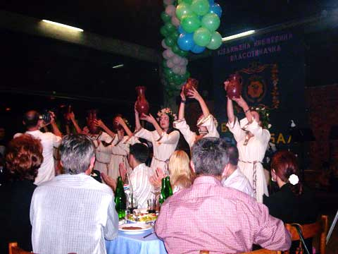 Власотинце, Вински бал, избор богиње вина.